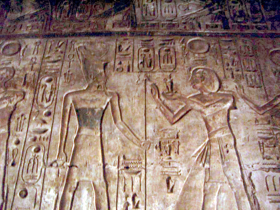 Relief représentant le pharaon Ramsès IV et la dieu Atoum - Temple de Khonsou à Karnak - XXe dynastie égyptienne.